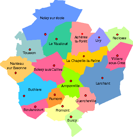 carte du canton nommée